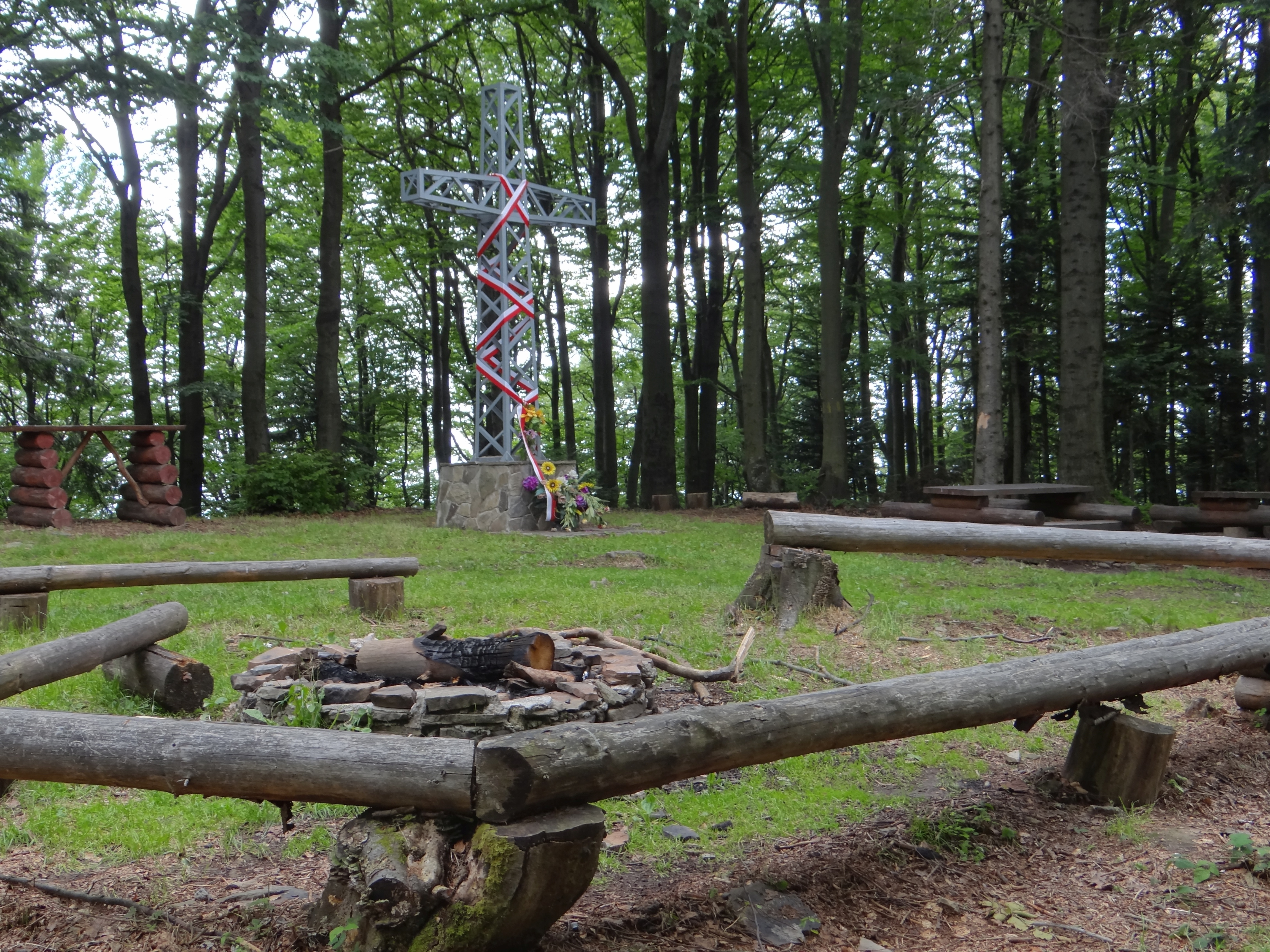 Szczyt Lubogoszcza Wschodniego